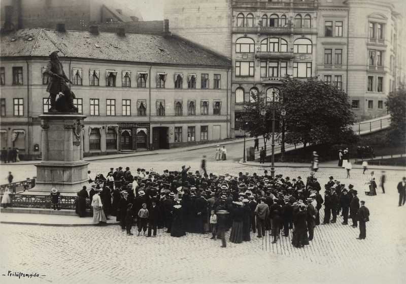 Tordenskiolds plass, Christiania Indremisjons oppbyggelsesmøte, tilskuere, bygårder, portrettstatue. Oscar Hvalbye (1864-1938) tok teologisk embetseksamen 25 år gammel. Han arbeidet for bymisjonen (Kristiania Indremisjon) og var prest i Sagene menighet. Som ivrig amatørfotograf samarbeidet han med sin gode venn Anders B. Wilse. Han var virksom i Oslo i perioden ca 1890-1920. Hans fotosamling ble i 1986 gitt til Oslo Bymuseum.